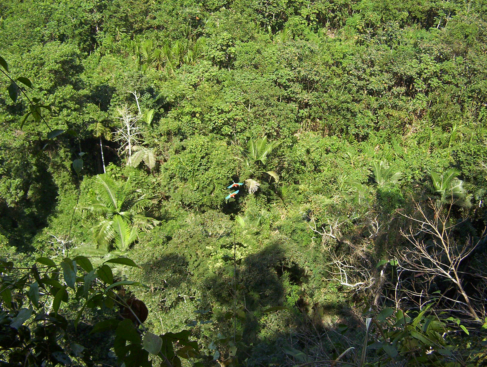 Parque Nacional Madidi, ubicado sobre el Rio Beni, cerca del pueblo de Rurrenabaque, Bolivia